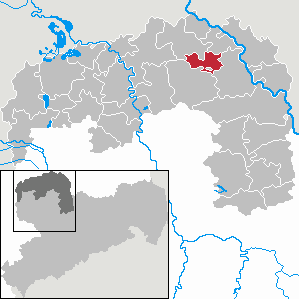 Dreiheide in Saxony - Landkreis Nordsachsen